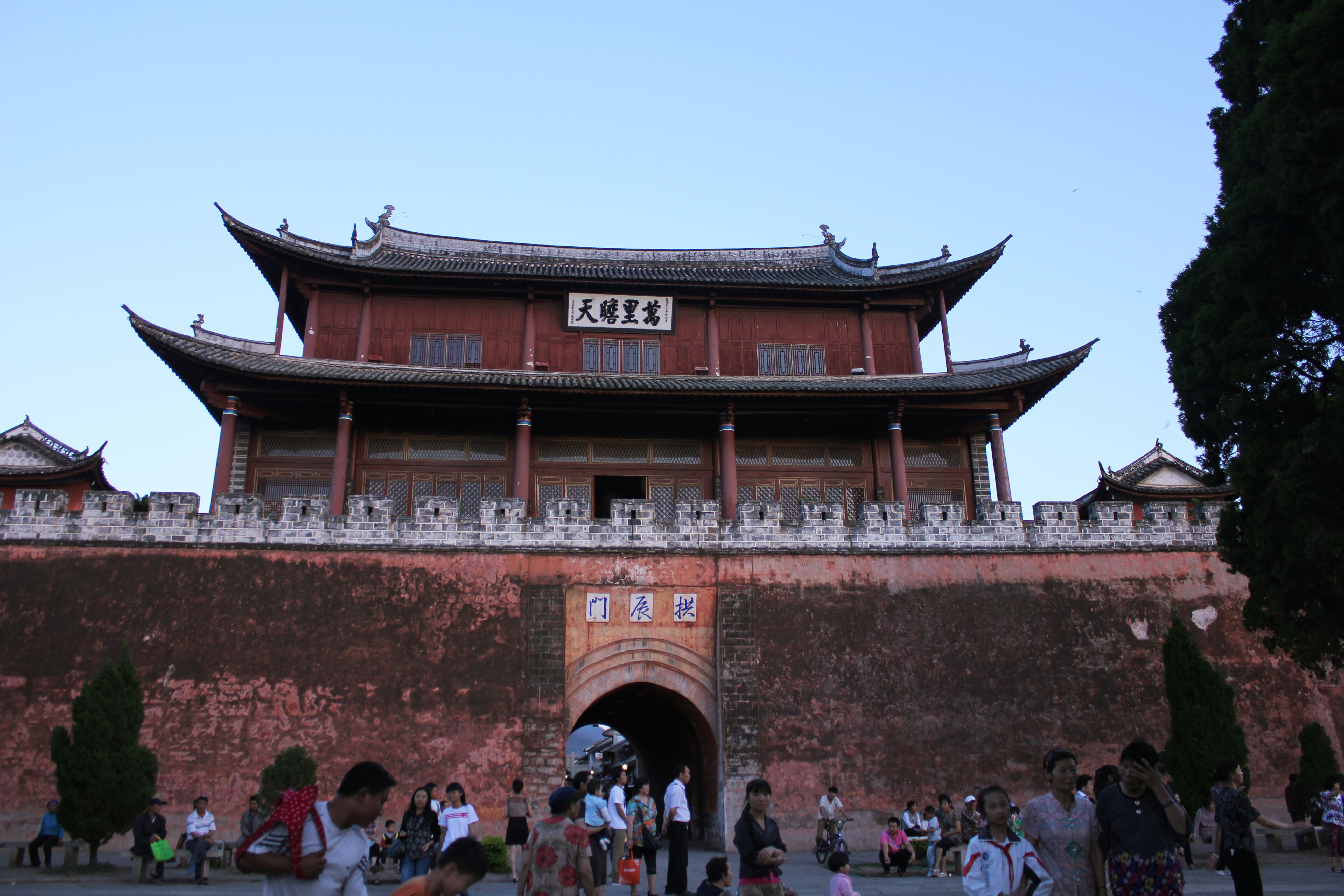 中国云南巍山古城内的拱辰门。